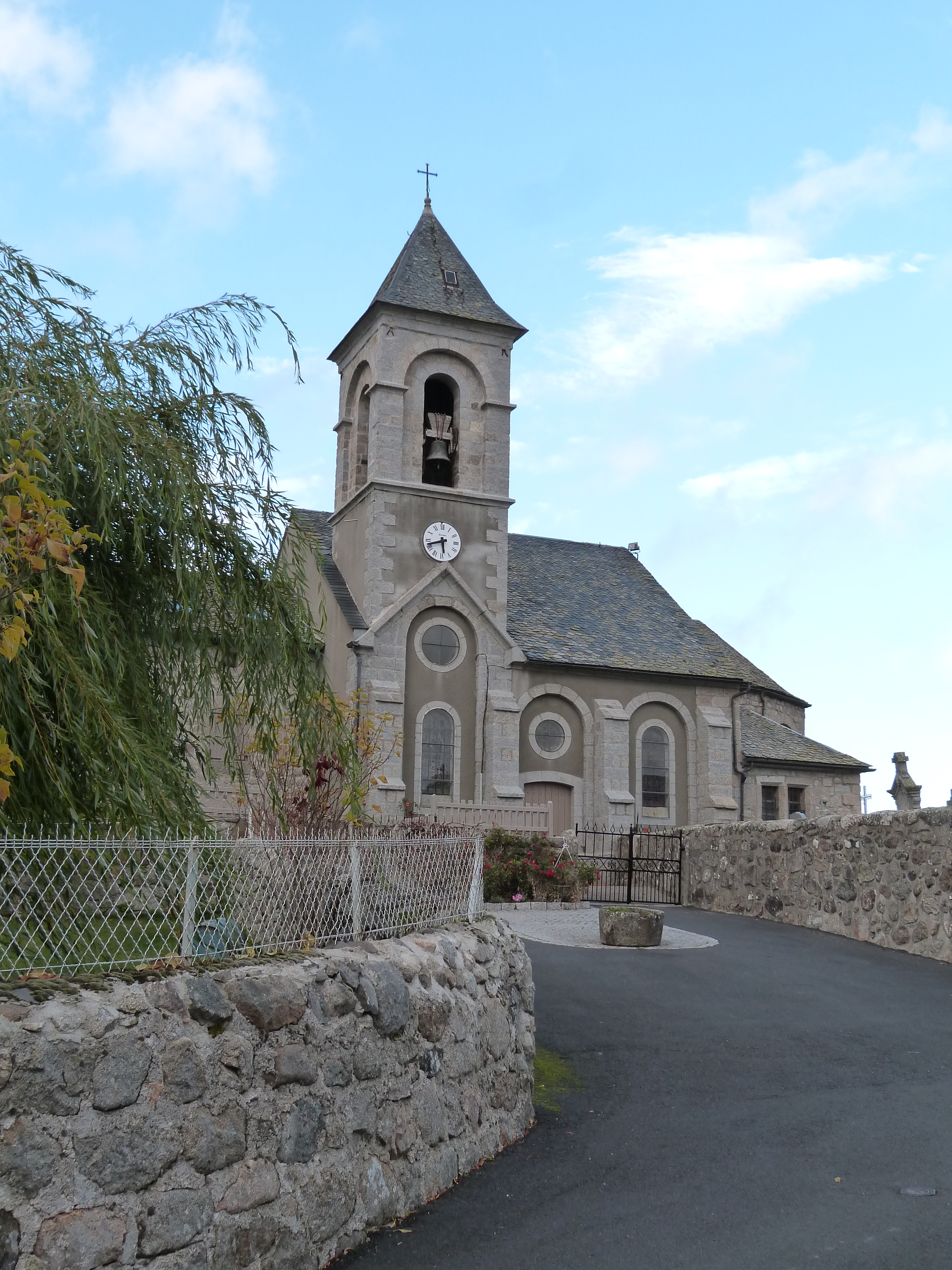 Eglise de Grandvals (Lozère)